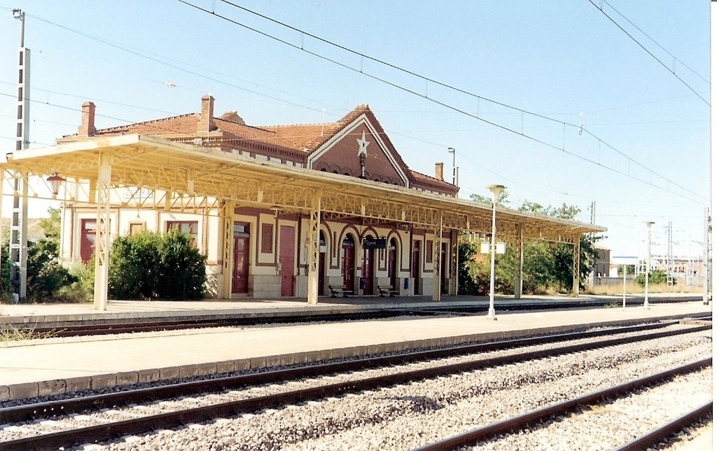 Edificio de viajeros de la estación de Zuera cuando circulaban trenes de ancho ibérico frente él. La situación cambió al utilizarse desde 2003 estas dos vías de apartado para dejar paso al AVE, obligando a los pasajeros a cruzar bajo las vías para acceder al tren convencional. Más tarde se retiró la marquesina y se tapió el edificio. La foto está tomada hacia 1996.